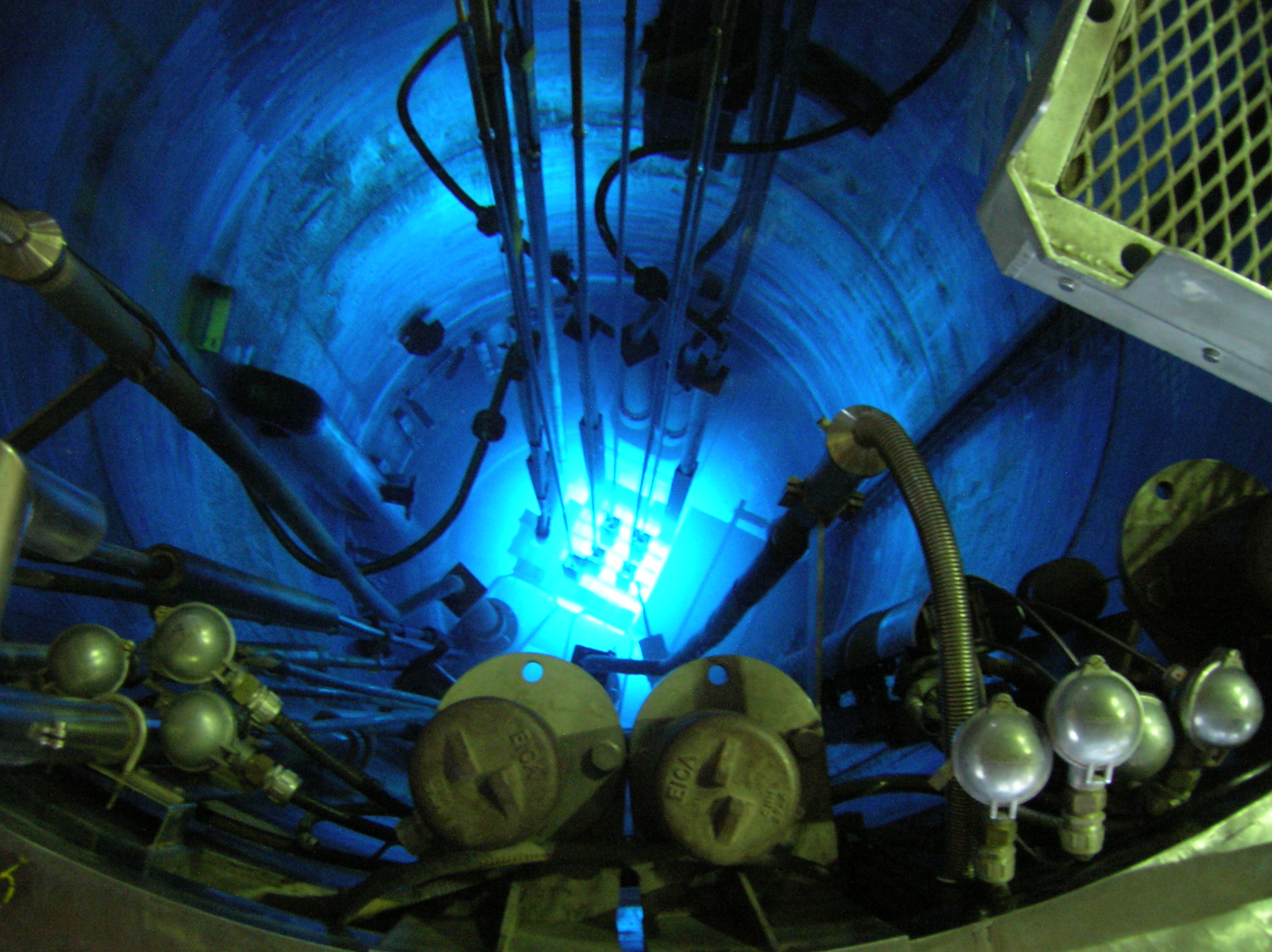 Reactor nuclear experimental RA-6 (Republica Argentina 6), en marcha, Centro Atomico Bariloche